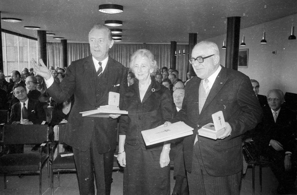 im Schloss. Der Direktor des Schleswig-Holsteinischen Freilichtmuseums Prof. Dr. Alfred Kamphausen (vorn, 3.v.l.) und der Verleger Axel Springer (vorn, 1.v.l.) bekommen die Fritz-Schumacher-Medaille in Gold für ihr Engagement in der Denkmalpflege und der Bewahrung von Kulturgütern von Emmele Toepfer (vorn, 2.v.l.) von der Stiftung F.V.S. zu Hamburg verliehen.